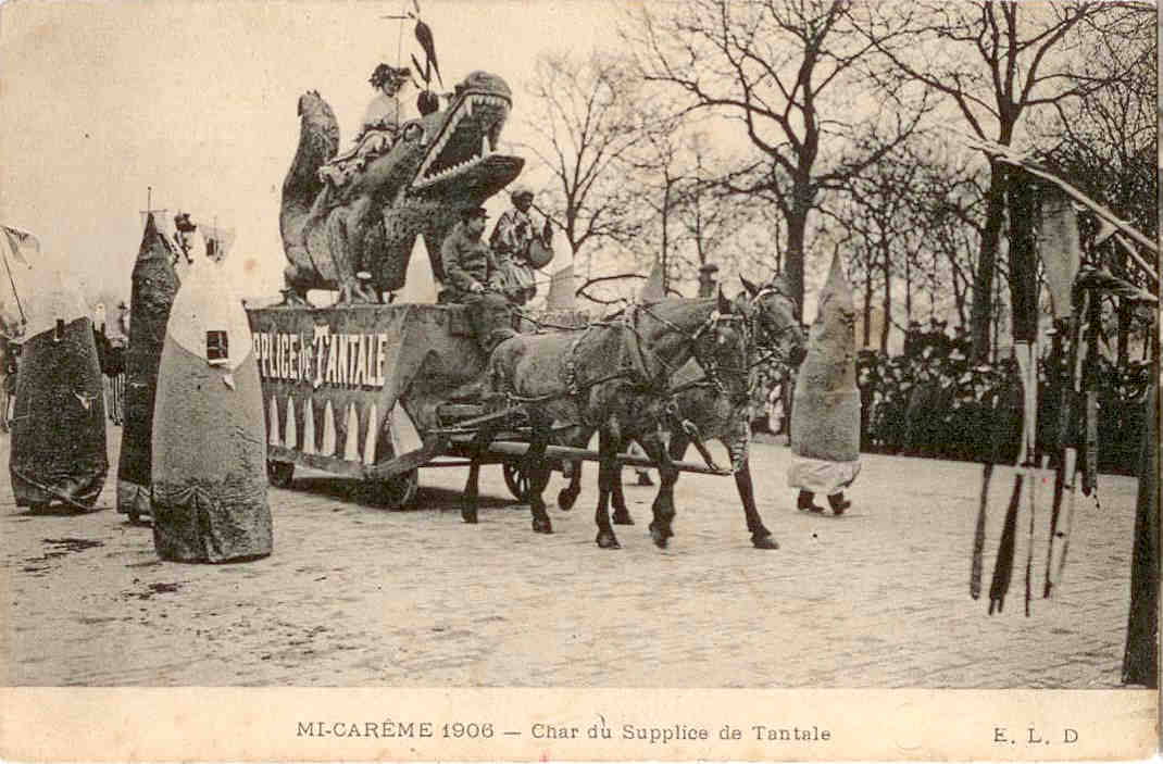 Char de la Mi-Carême au Carnaval de Paris 1906